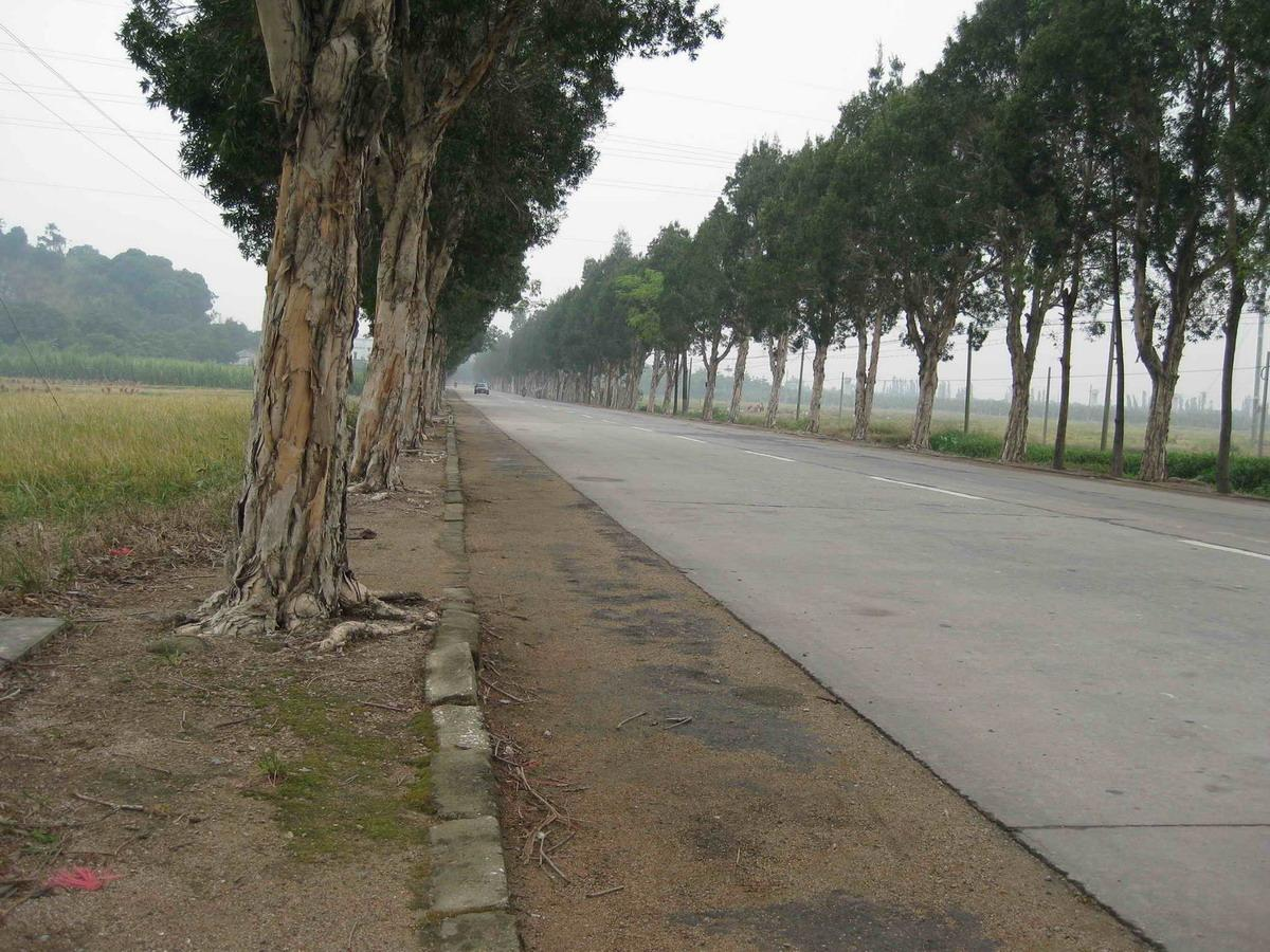 中文（香港）: X540新会古井段